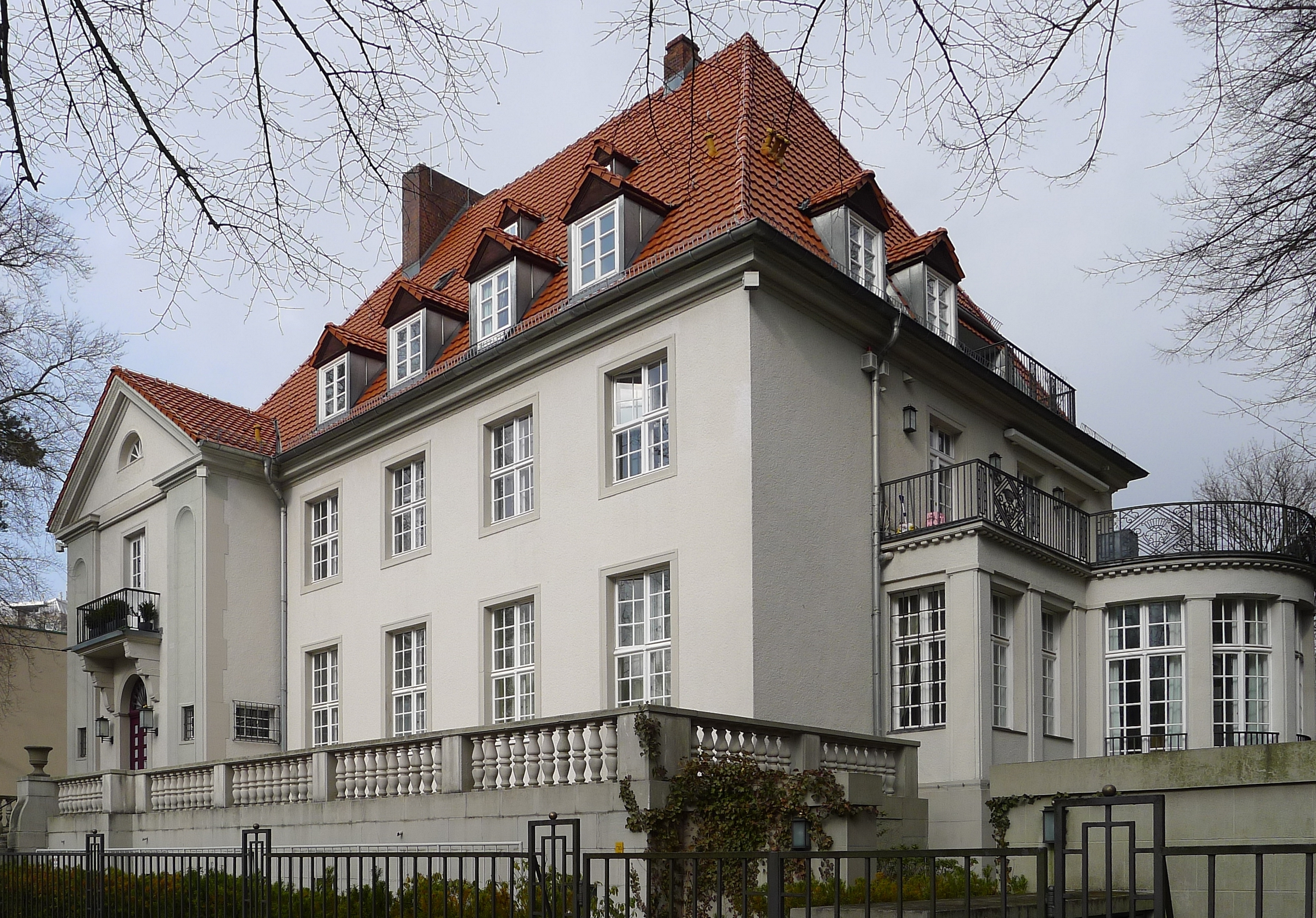 Villa